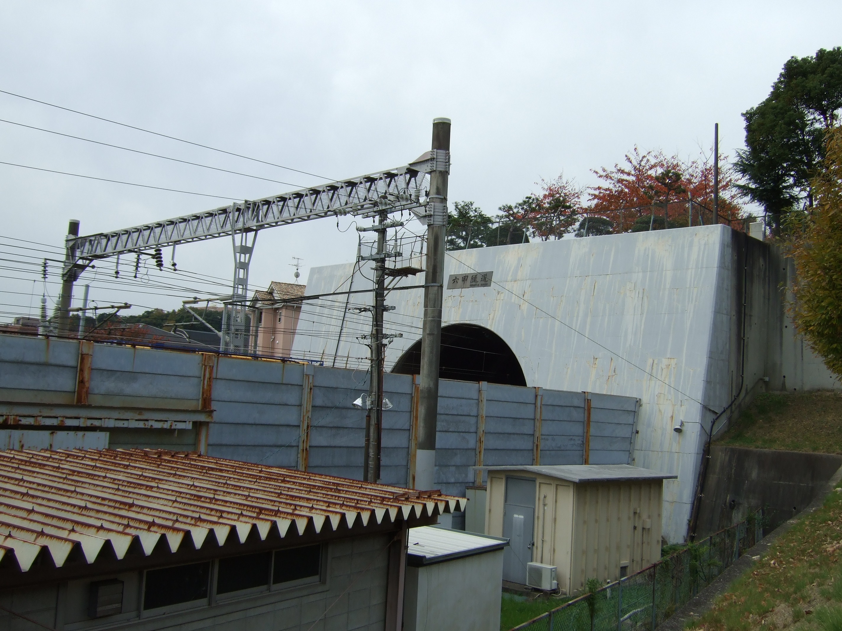 山陽新幹線六甲トンネル入口。